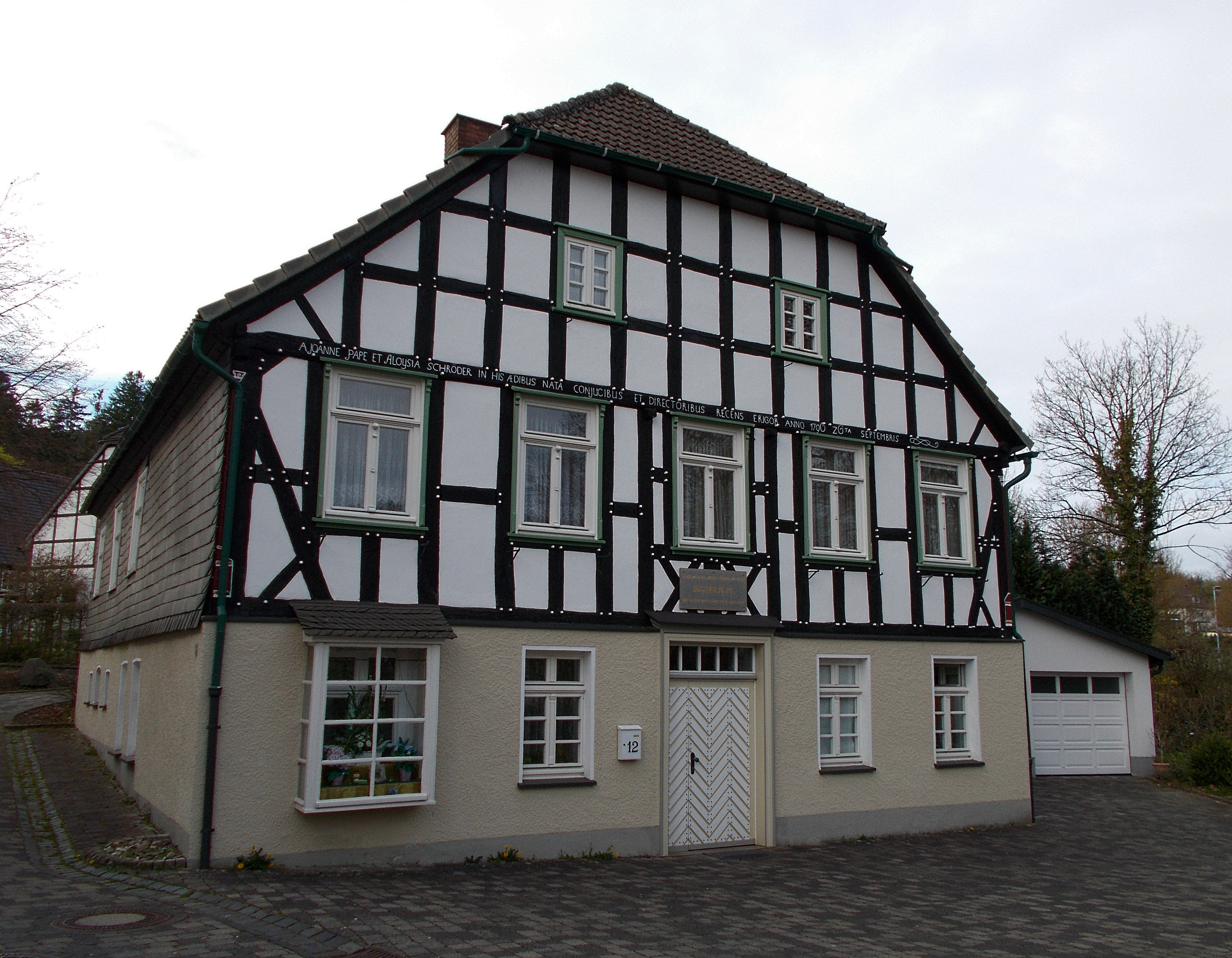 Denkmalgeschütztes Haus Joseph Pape in Eslohe, Papestr. 12 (Germany)